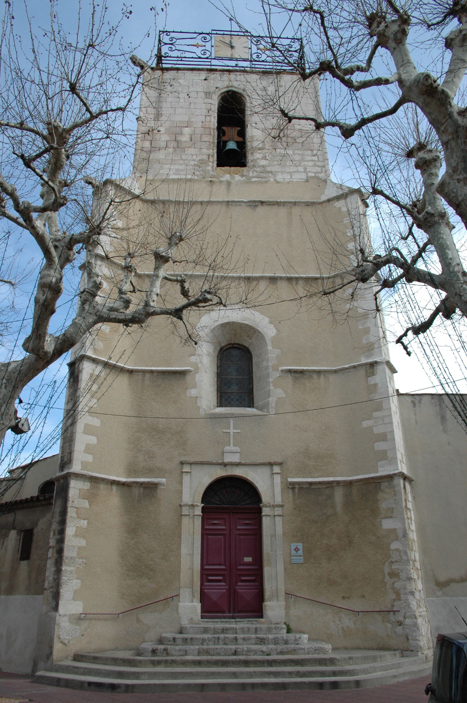 Église Saint-Nicolas, 3 rue de l'Église (Classé, 1992) .